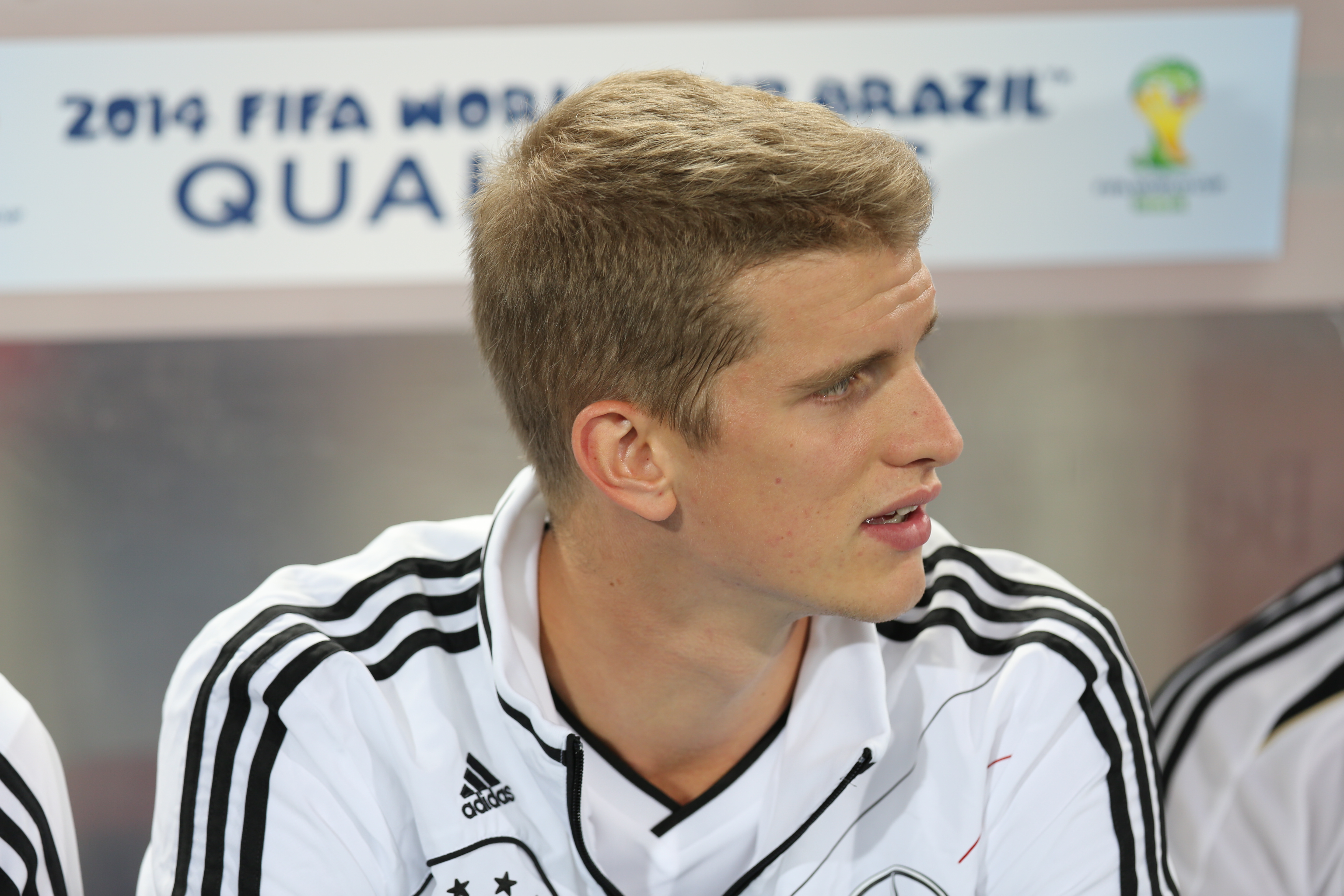 Fußball-Weltmeisterschaft 2014/Qualifikation (UEFA), Gruppe C, 11. September 2012, Österreich gegen Deutschland im Wiener Ernst-Happel-Stadion. The making of this work was supported by Wikimedia Austria. For other files made with the support of Wikimedia Austria, please see the category Supported by Wikimedia Österreich.